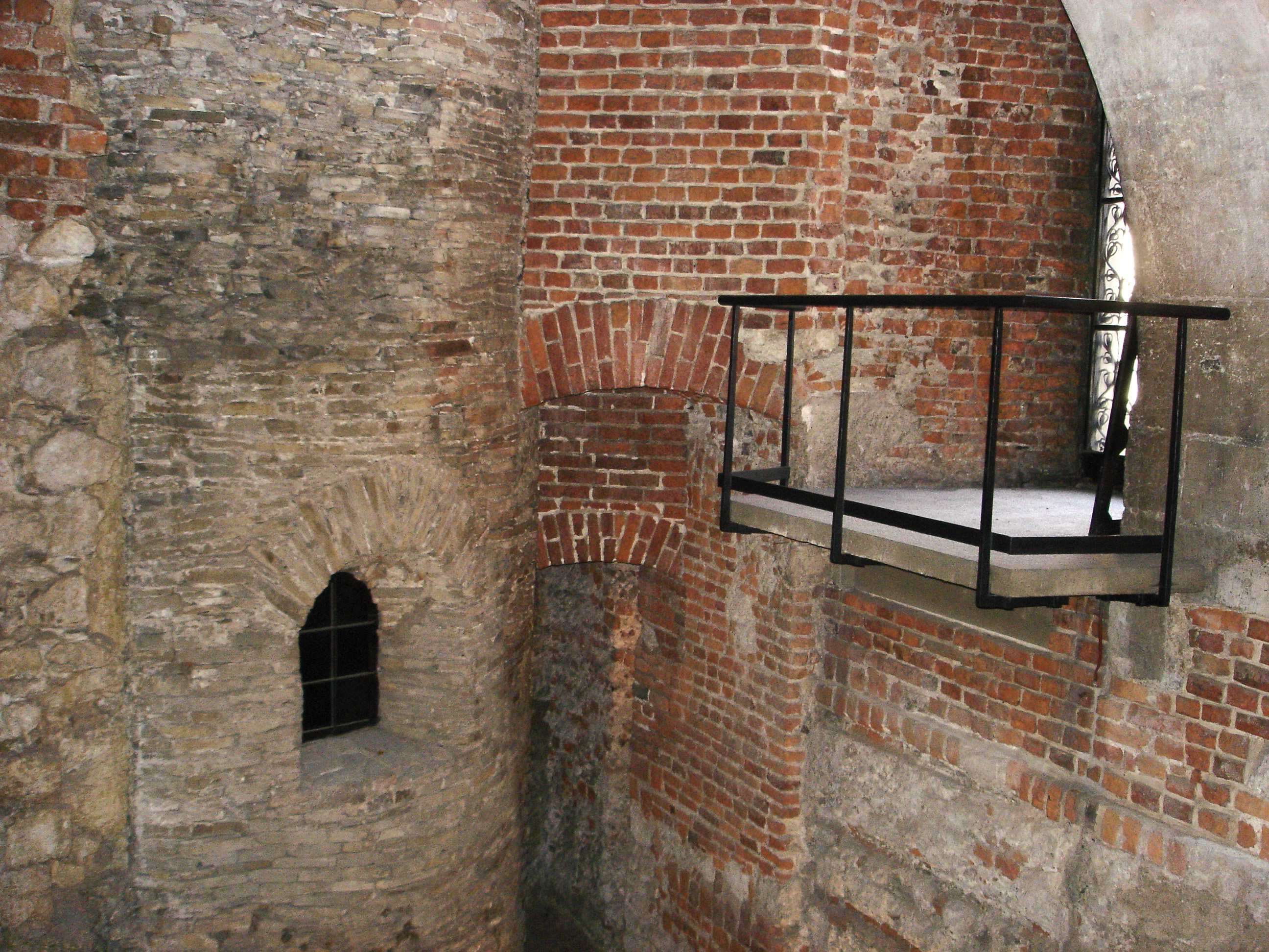 Grundmauern der Wawel während der Besuchertour "Versunkener Wawel"